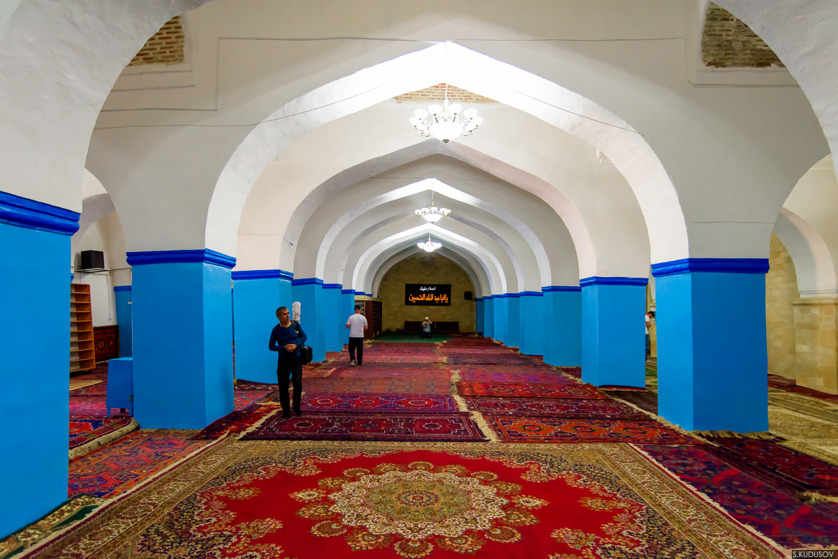 Джума мечеть Дербента